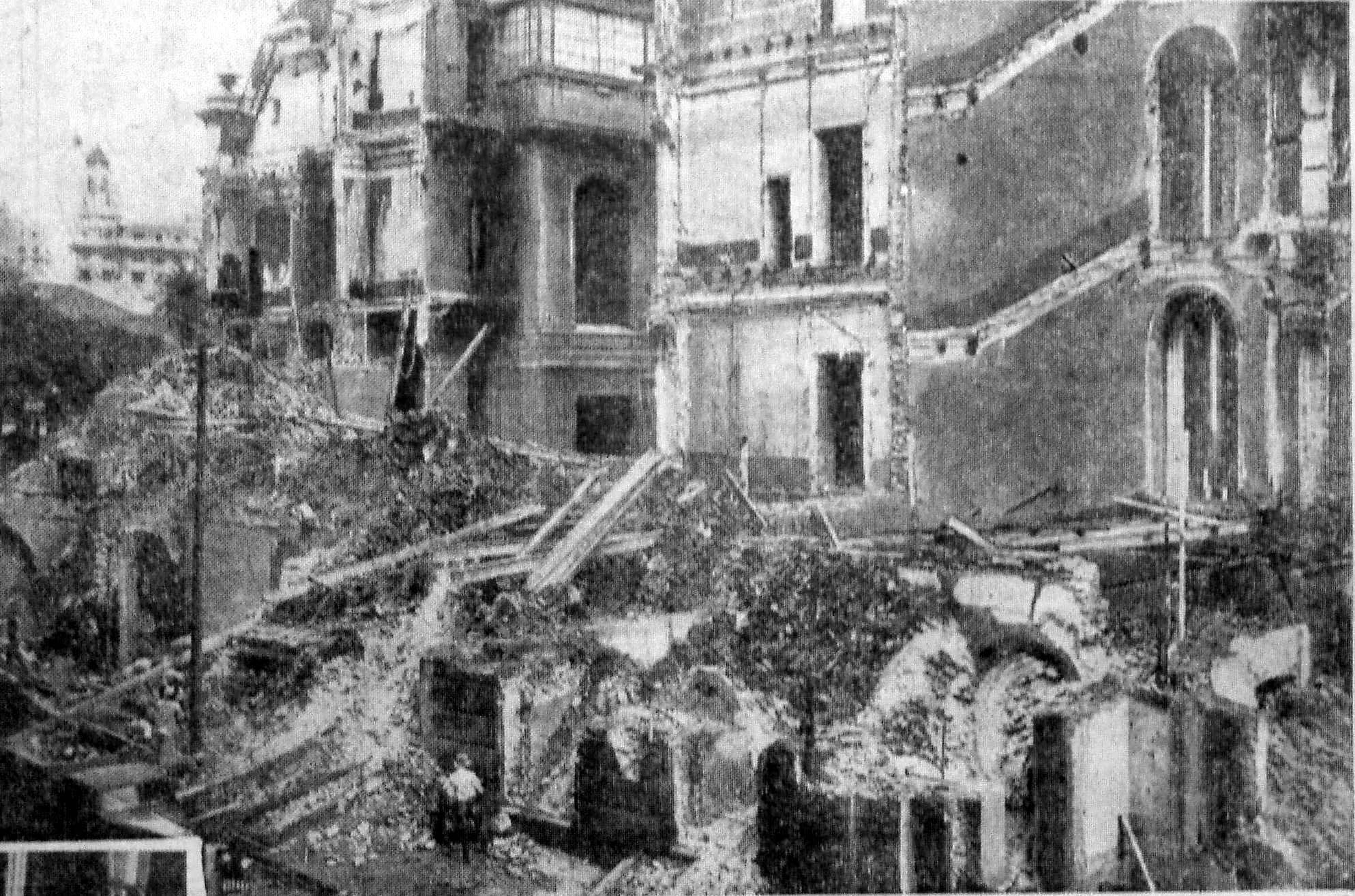 Vista de las obras de demolición de una parte del edificio de la Casa de Gobierno de la República de Argentina. Se trataba del lateral que miraba a la calle Victoria (hoy Hipólito Yrigoyen), y permitió el ensanche de aquella.